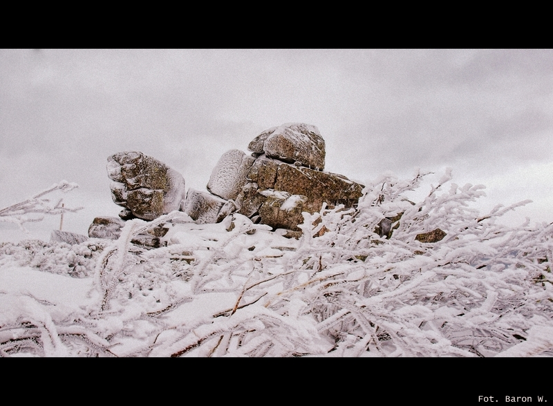 Skałki nieopodal szczytu Szrenicy